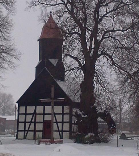 Rekowo - kościół szachulcowy pw. św. Apostołów Piotra i Pawła (zabytek nr 238)